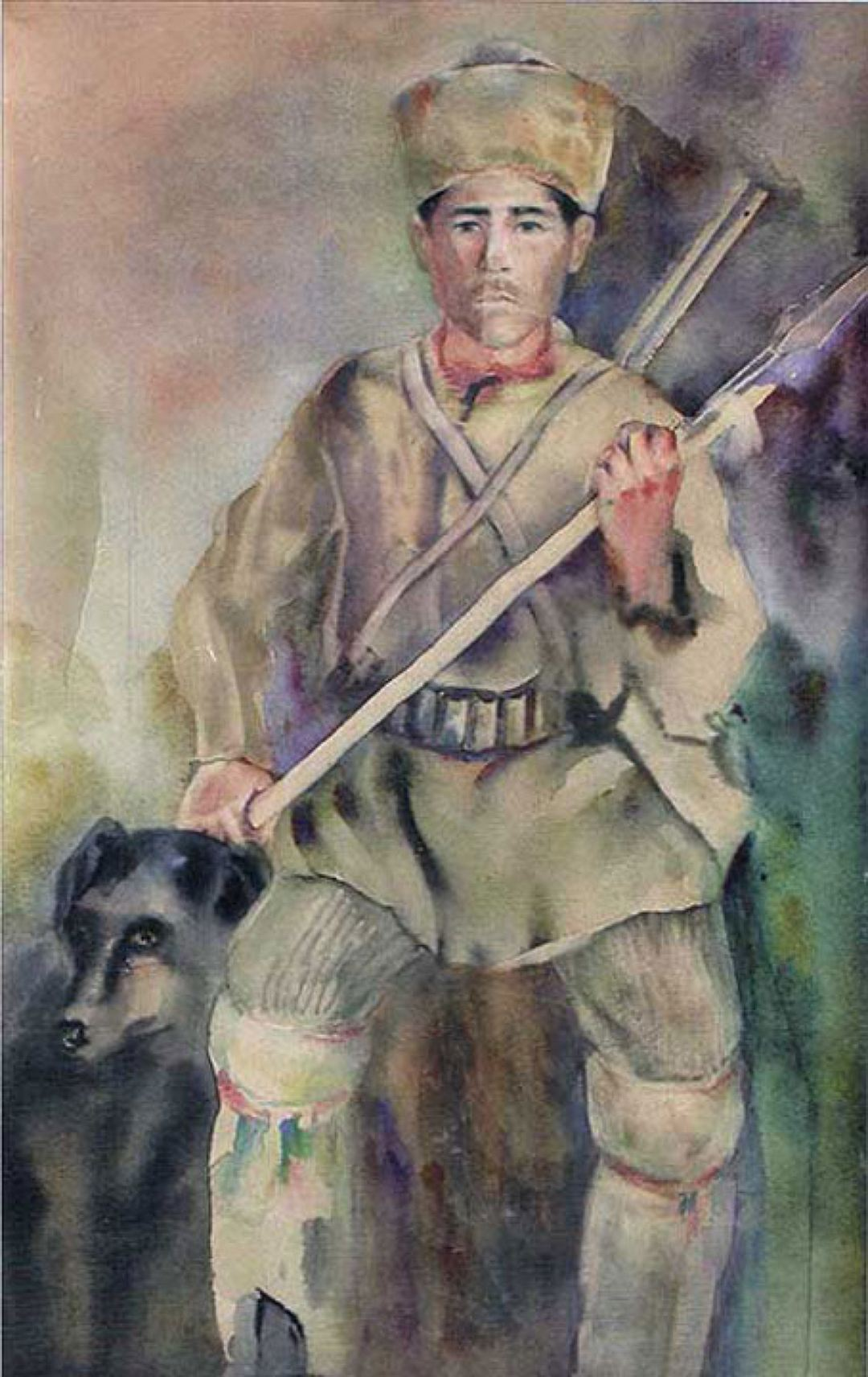 картина художника Девлеткильдеева Касима (1887—1947). Башкир-охотник